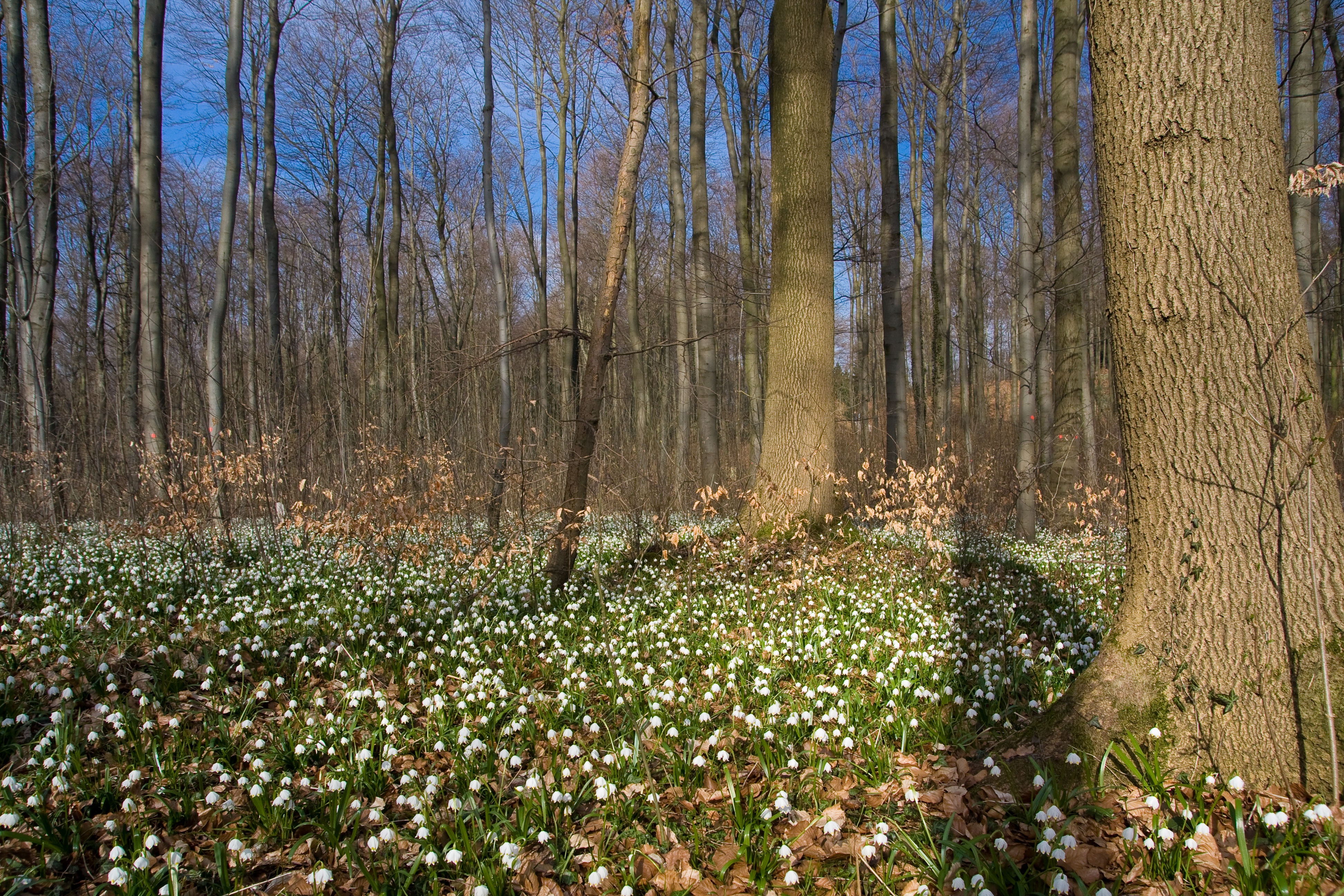 Blüte der Märzenbecher im Naturschutzgebiet des Stadtforstes Hameln